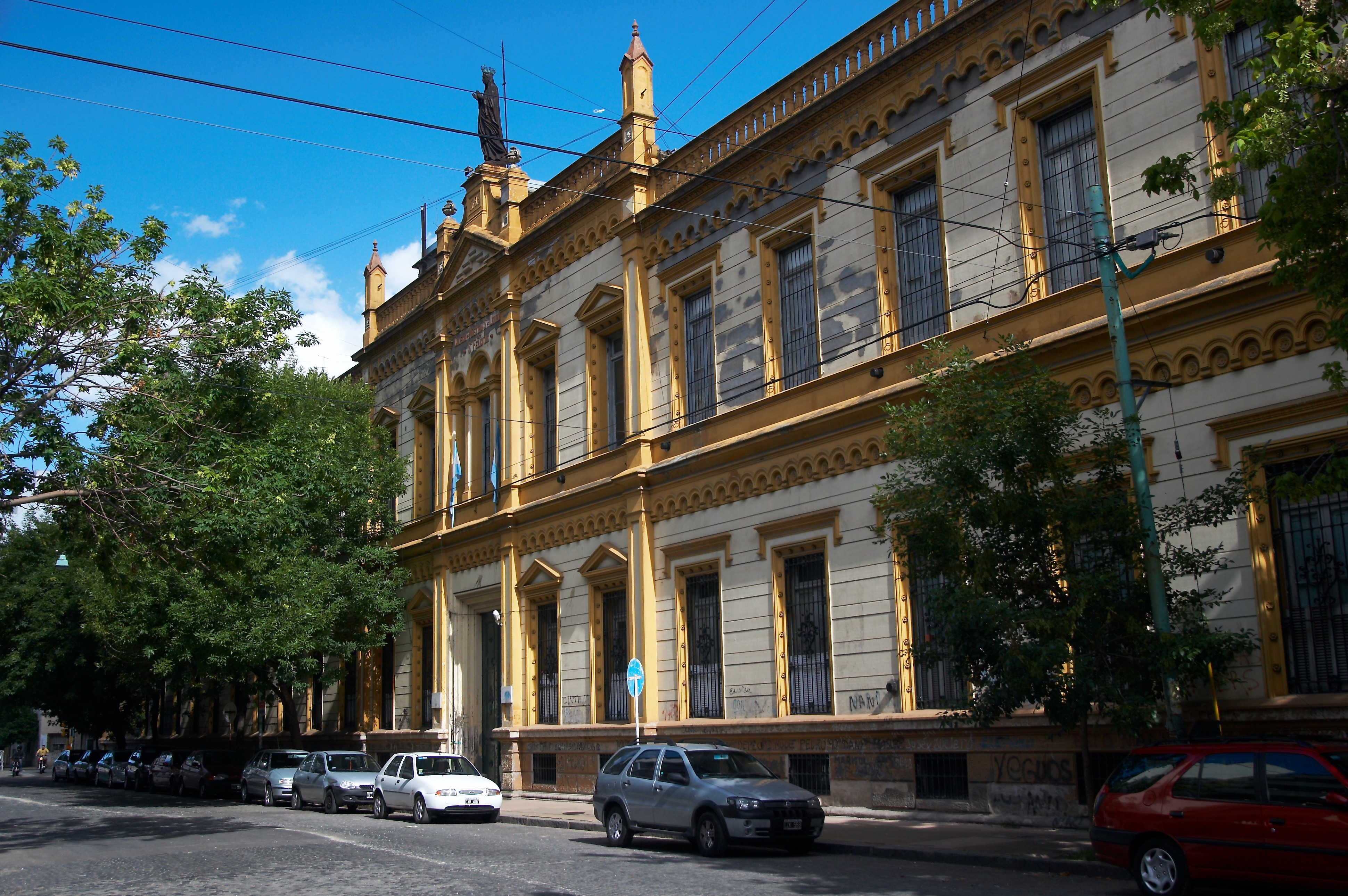 Colegio Santa Felicitas, barrio de Barracas, Buenos Aires, Argentina.